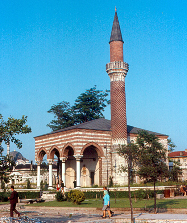 İstanbul'un Saraçhane semtindeki Burmalı Mescid Camii